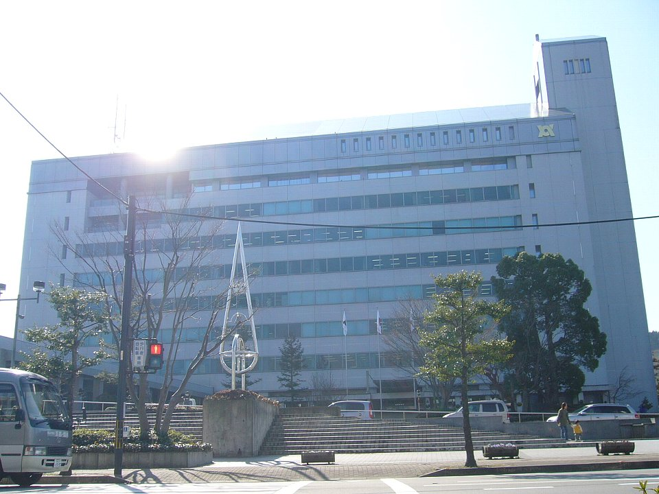 Kameoka City Hall in Kyoto-fu, Japan